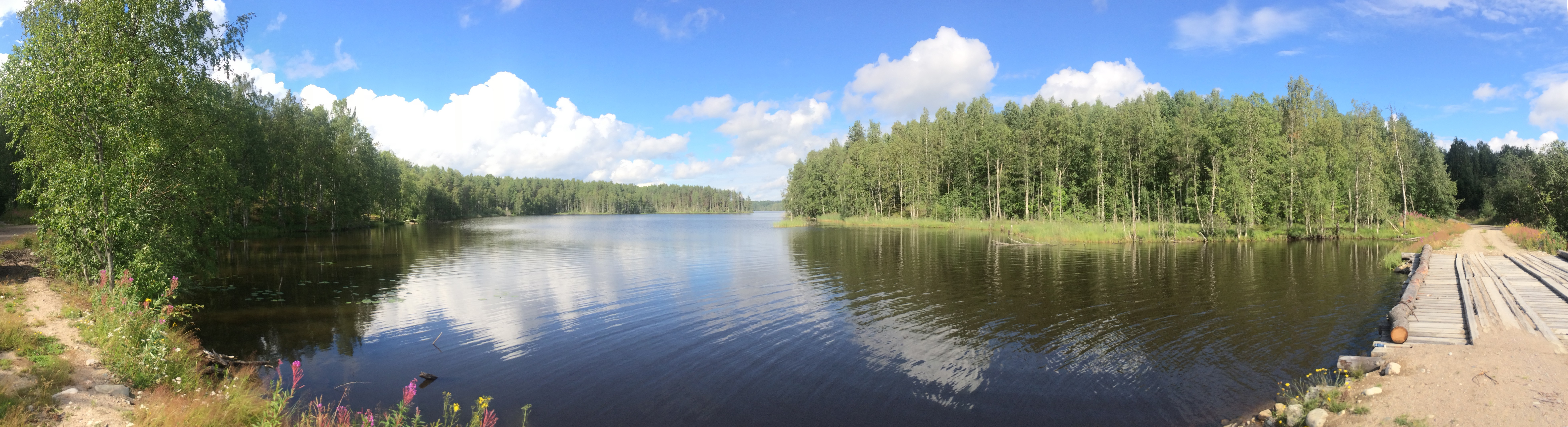 Пелдо